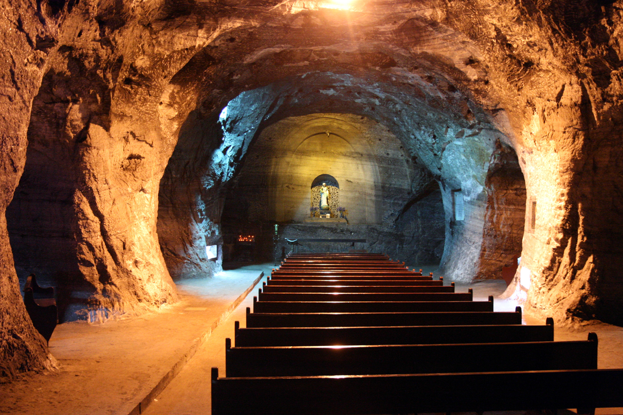 Catedral de Sal de Zipaquira (Colombie)